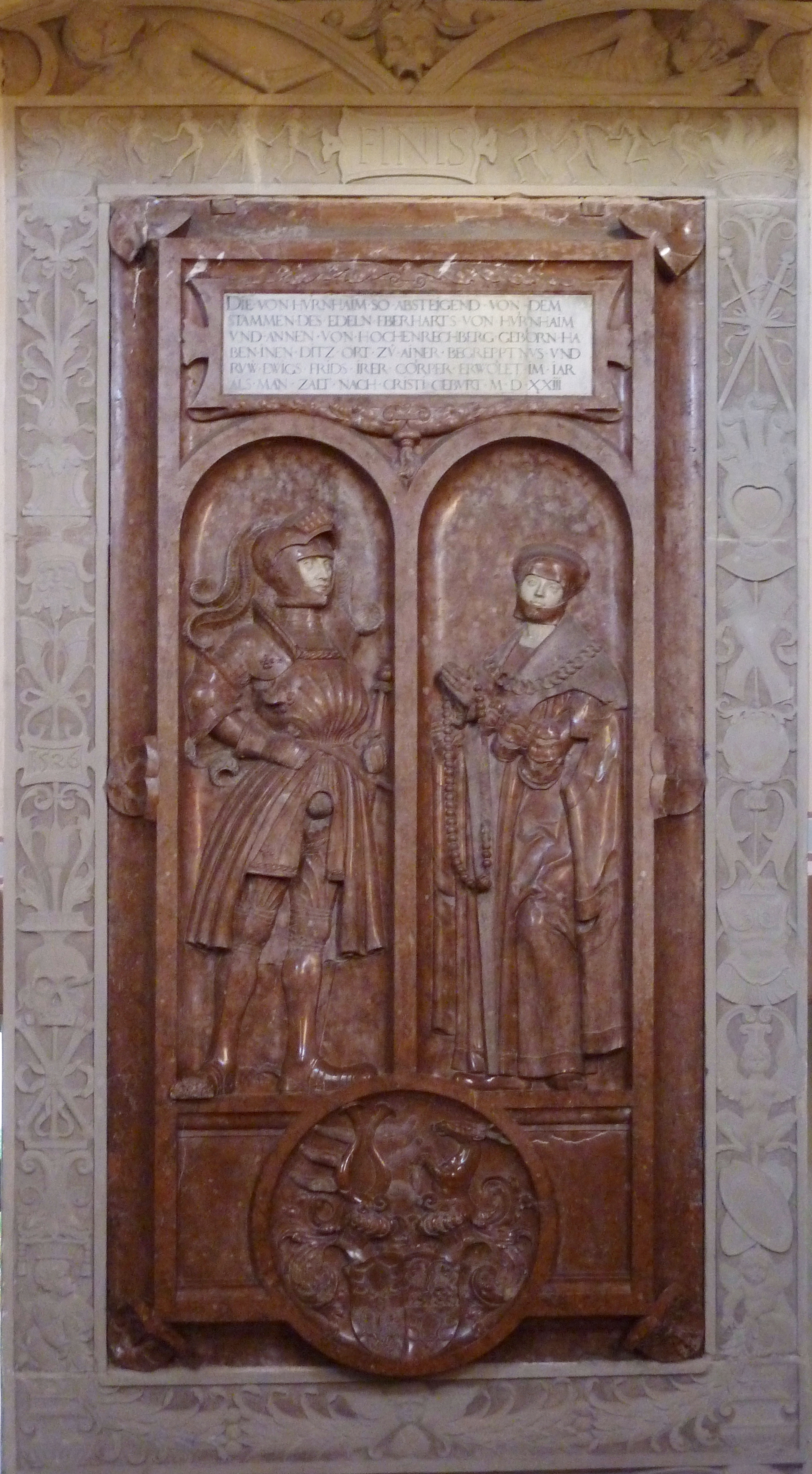 Katholische Pfarrkirche Mariä Himmelfahrt in Hochaltingen, einem Ortsteil von Fremdingen im Landkreis Donau-Ries (Bayern), Renaissancegrabmal (von 1526) von Eberhard von Hürnheim und seiner Gemahlin Anna von Hohenrechberg in der Gruftkapelle, Rotmarmorplatte mit überlebensgroßen Figuren, Gesichter aus Alabaster, mit Inschrift und Allianzwappen